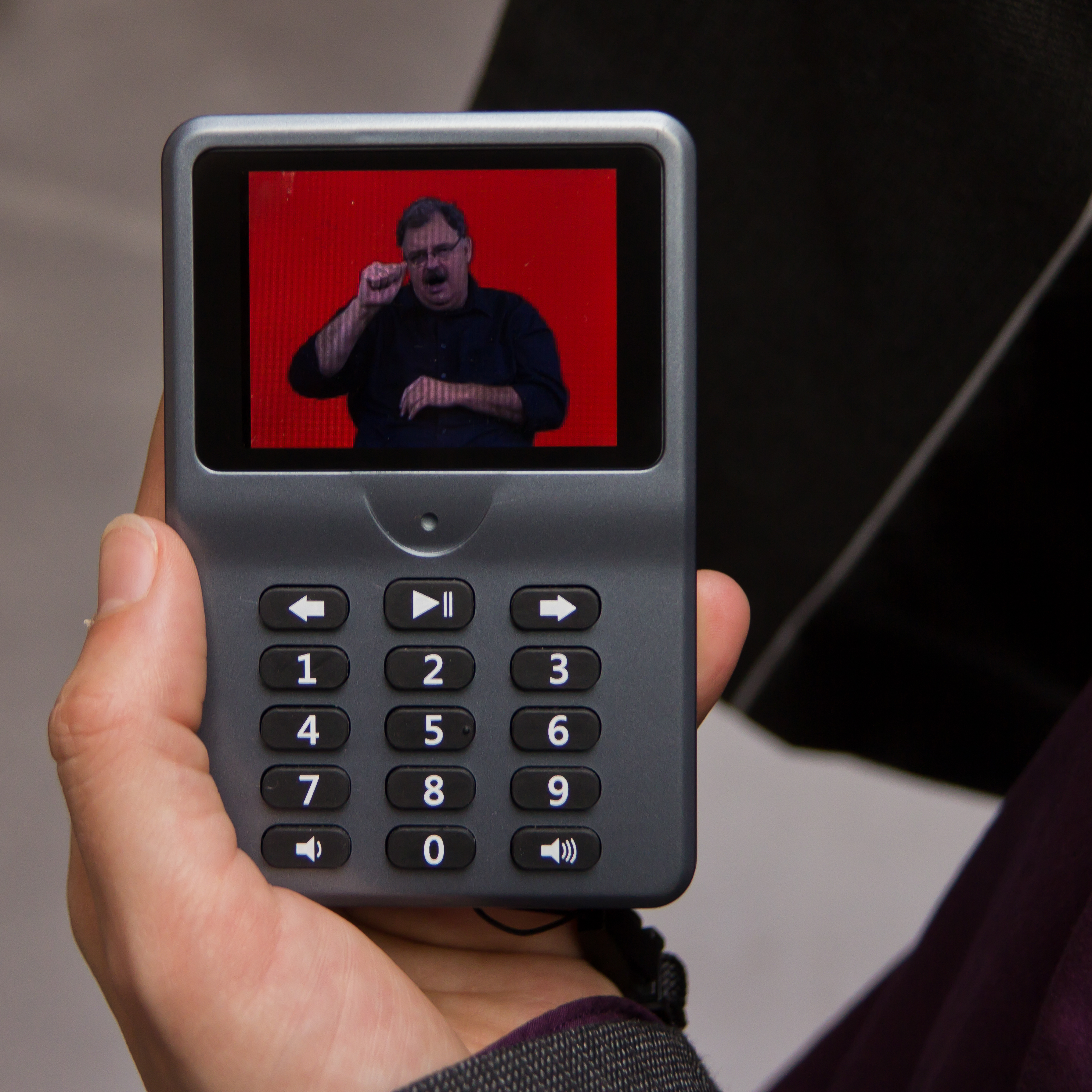 Pressegespräch im Rautenstrauch-Joest-Museum: Einführung von Videoguides für Gehörlose.